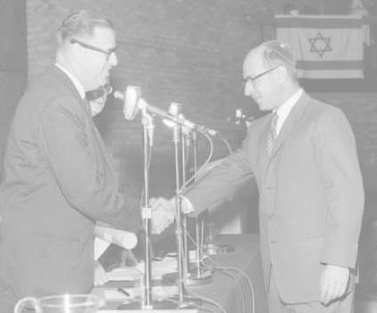 זאב לב מקבל פרס ישראל 1962 צלם יהודה איזנשטרק גנזך המדינה